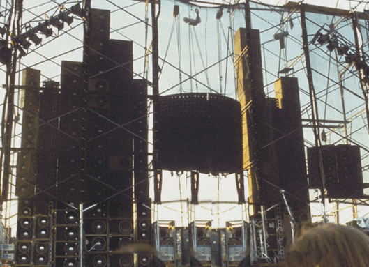 Zvukový systém na tour